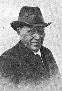 Casimiro Gómez Cobas, fotografía en Vida Gallega 1928